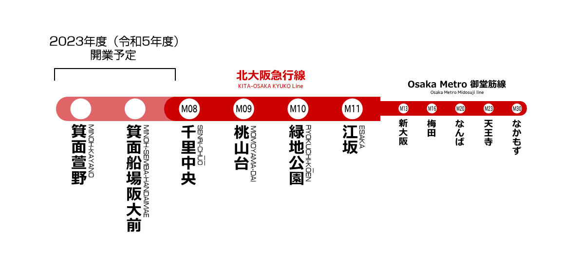 北大阪急行電鉄南北線路線図